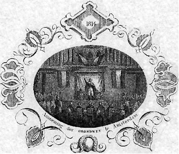 Passing of the Constitution of the Netherlands, the Grondwet voor de Vereenigde Nederlanden in 1814, historical engraving